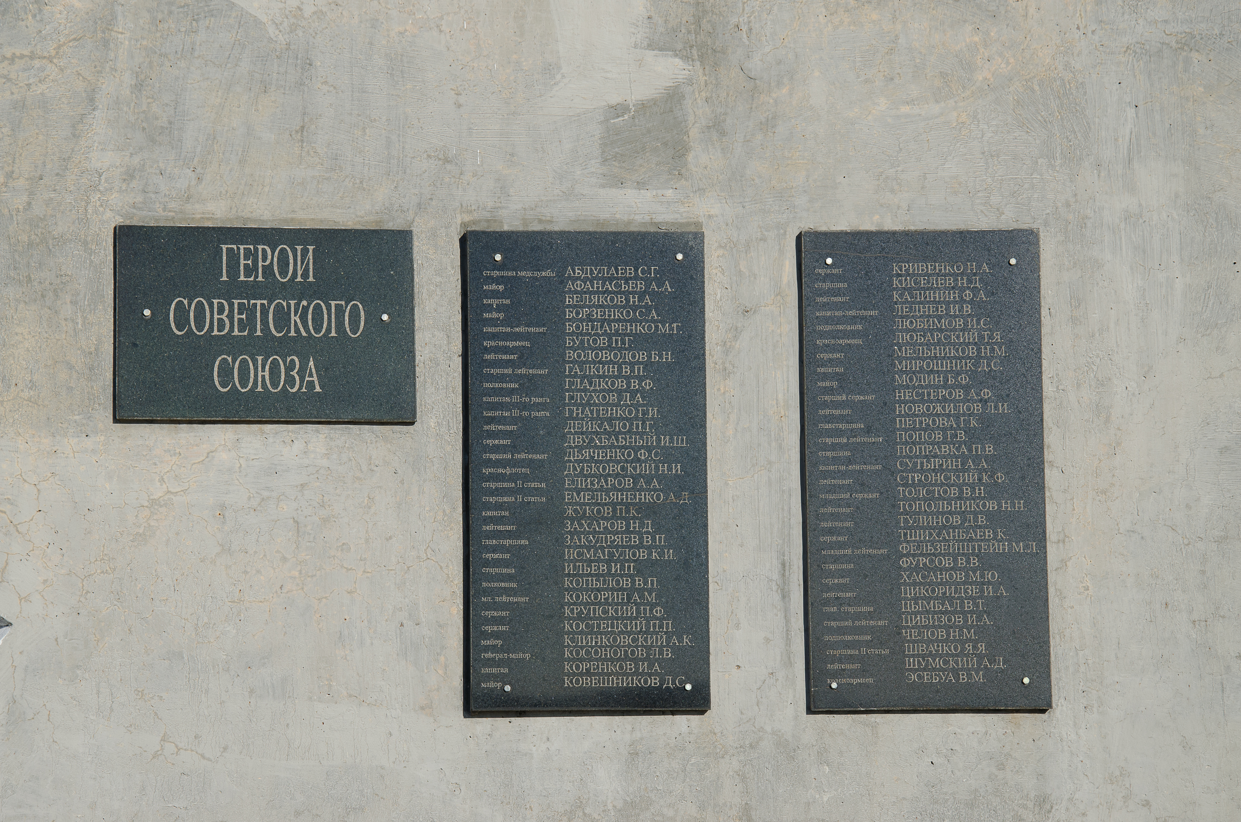 Мемориальный комплекс «Героям Эльтигенского десанта». Дата событий: 1943 г. Дата сооружения: 1985 г.: улица Галины Петровой, район Эльтиген, Керчь, Крым This object is located on the Crimean Peninsula and recognized as cultural heritage by Russia under the monument ID: 8230419000. The legal status of the Crimean region is currently disputed.